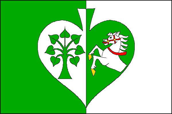 Vlajka obce Pokřikov